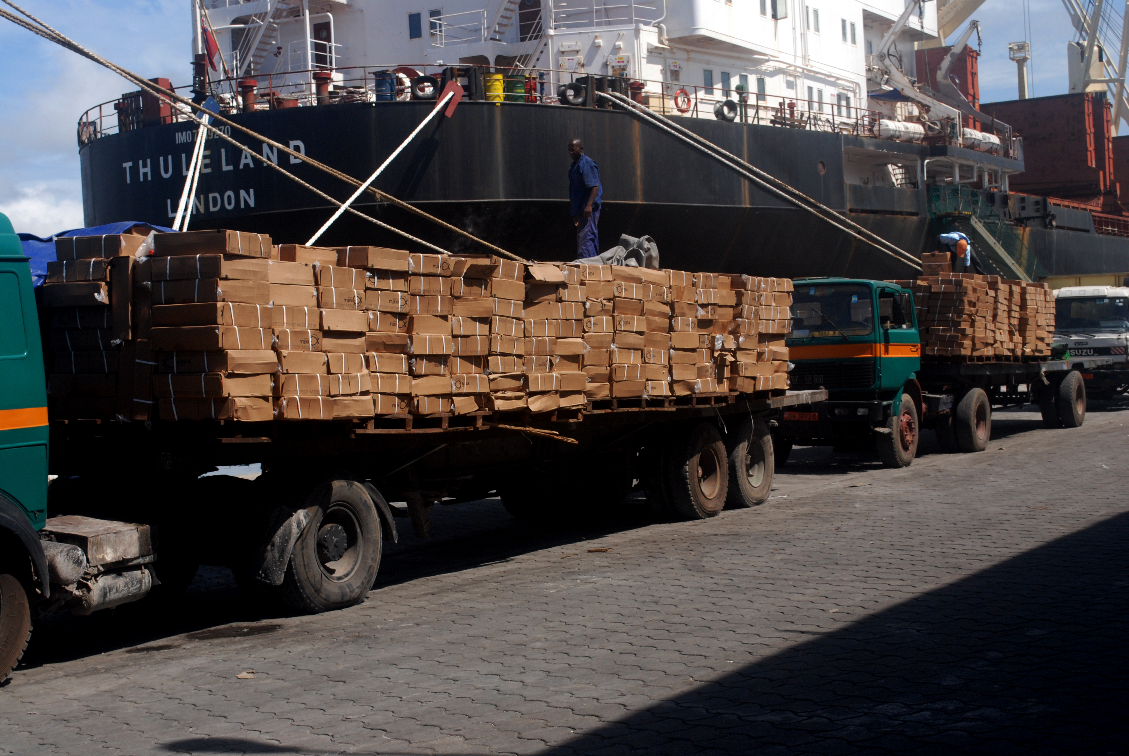 débarquement du poisson au port de Douala au Cameroun. This is an image with the theme "Africa on the Move or Transport" from: Cameroon